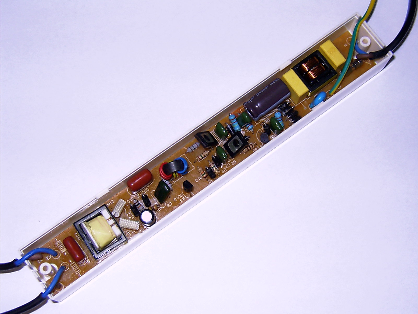 Geöffnetes Elektronisches Vorschaltgerät (EVG) für T8 Leuchtstoffröhren. Rechts oben befindet sich der Anschluß für die Netzspannung (220V~ 50Hz), unten links der Anschluß (250V=) für die Kathoden der Leuchtstoffröhre.